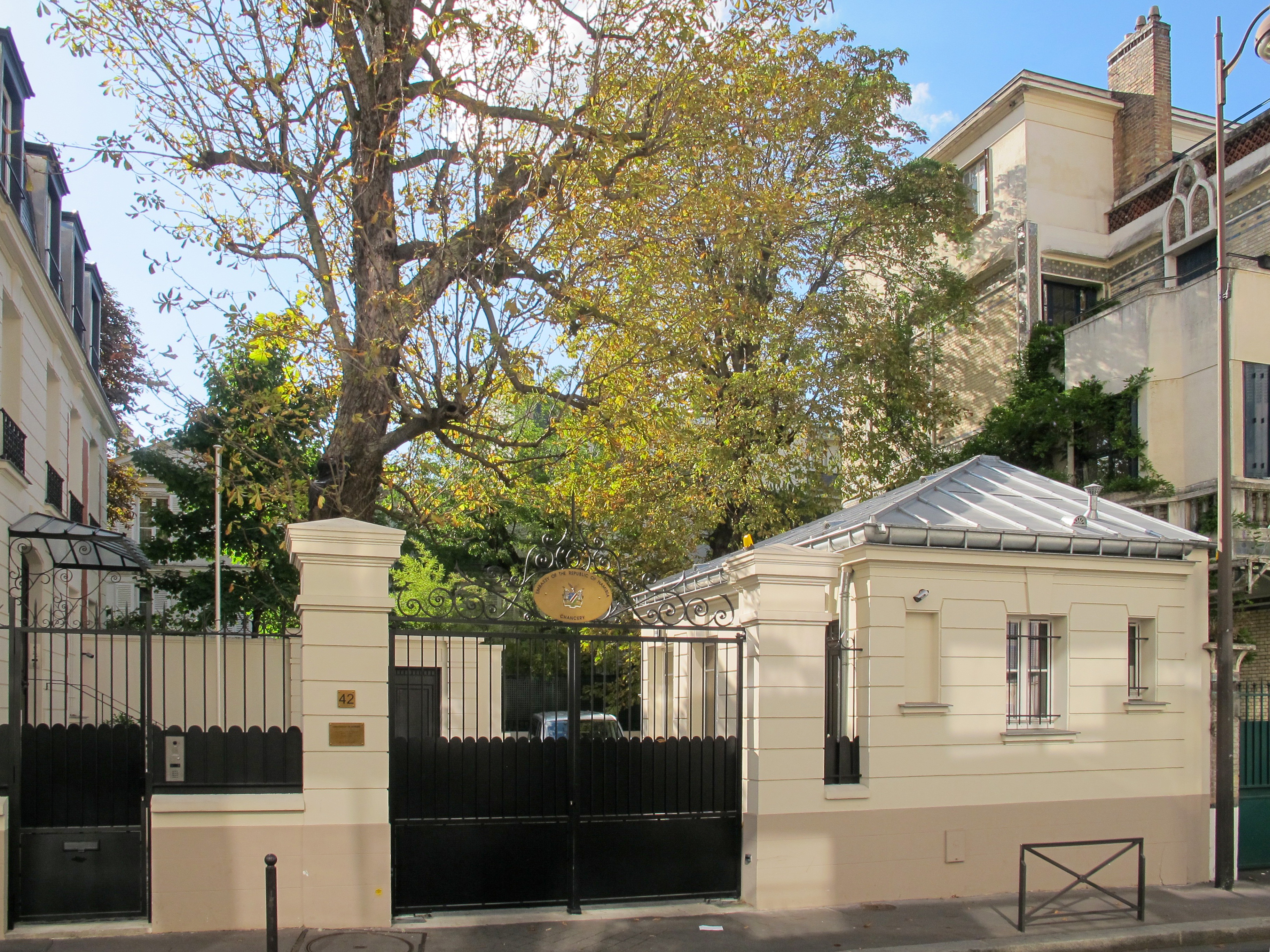 Ambassade de Namibie, n°42 rue Boileau (Paris, 16e).